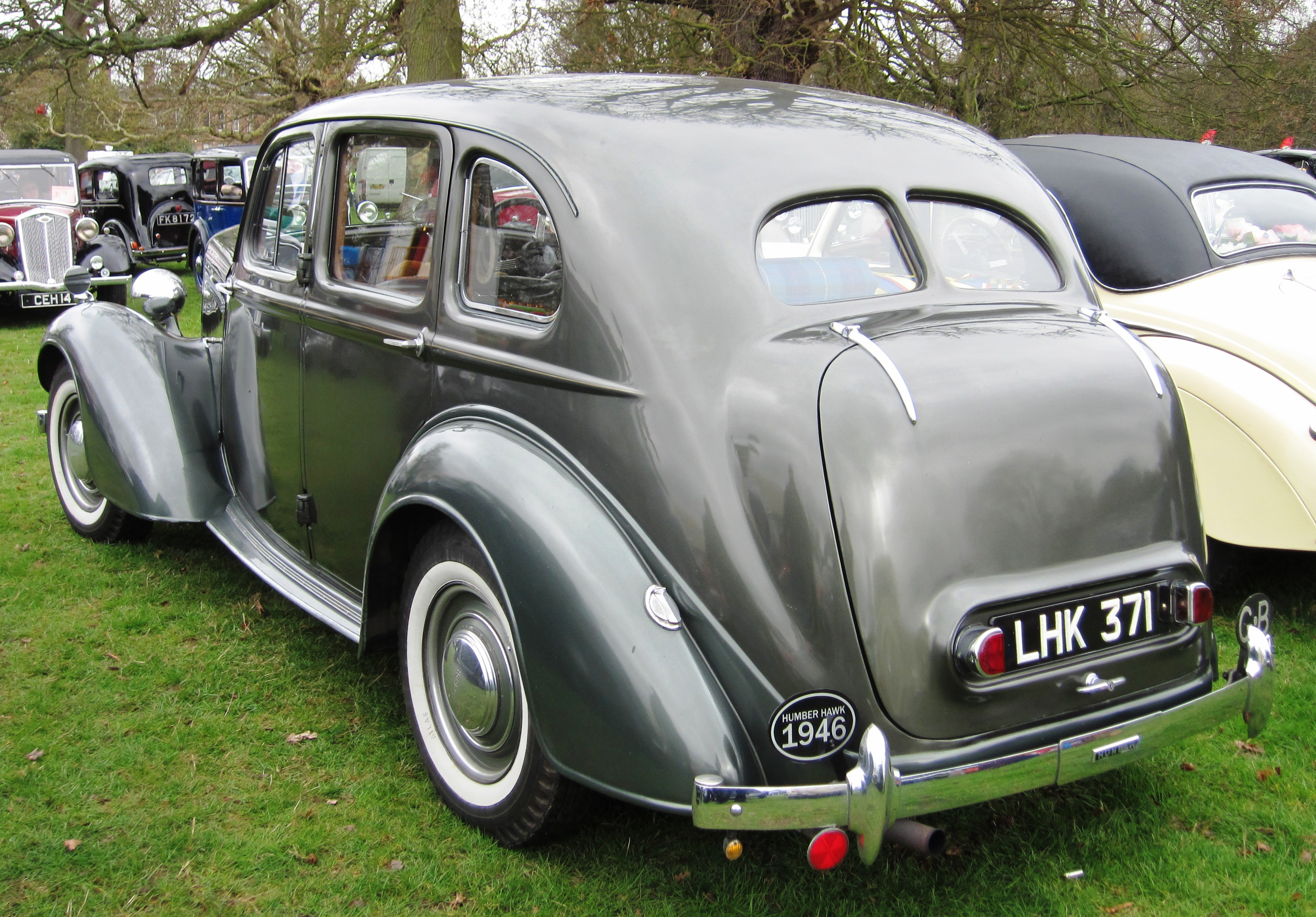 Humber Hawk first reg Essex Nov 1946 1701cc rear three quarters view at Weston Park